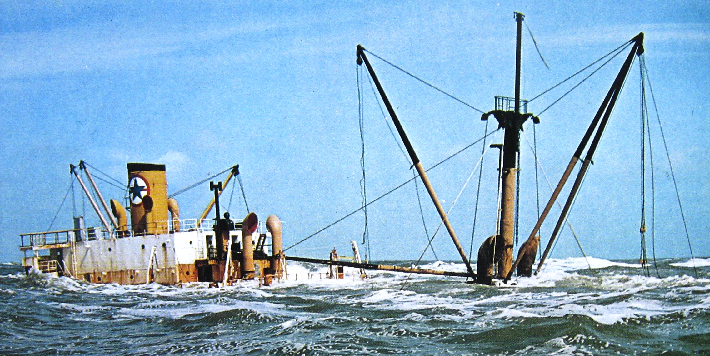 épave de navire dangereux pour la navigation.